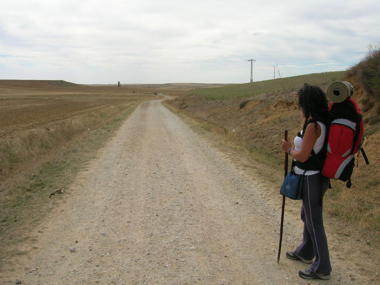 Meseta cerca de Moratinos (Después de una pequeña siesta, son casi las 5 de la tarde y todavía nos queda un largo camino por andar hasta San Nicolás del Real Camino. Menos mal que ese día Lorenzo no apareció implacable como de costumbre, pues las nubes nos cobijaron de su calor de justicia.)